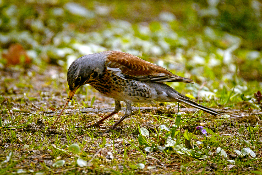 Fieldfare (Turdus pilaris) pulling a worm from the ground. Kwiczoł (Turdus pilaris) wyciągający dżdżownicę z ziemi.